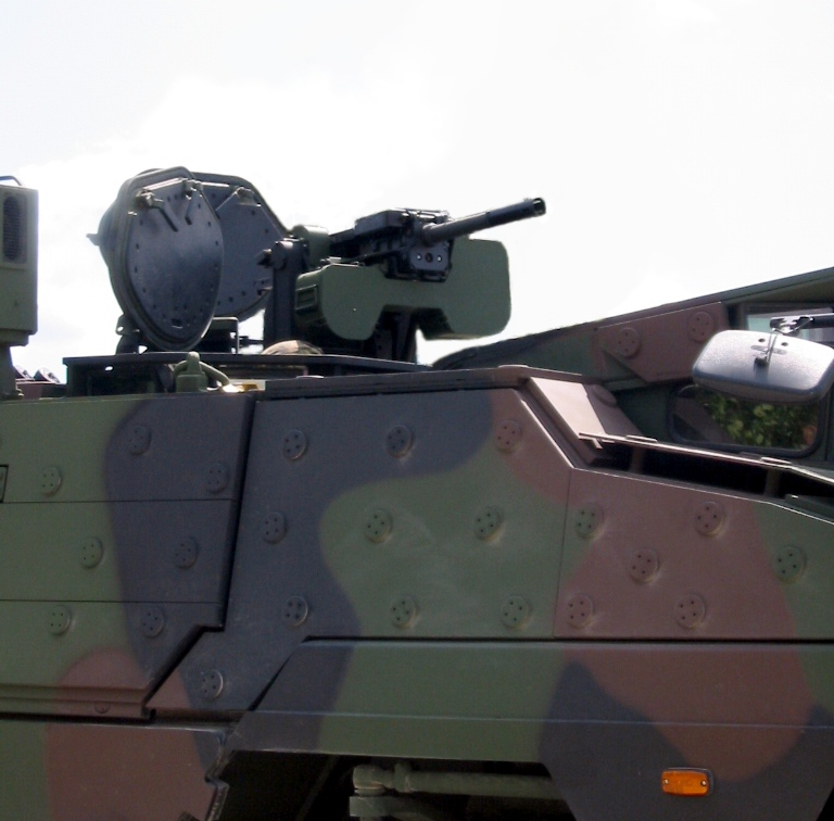 GTK Boxer Gun